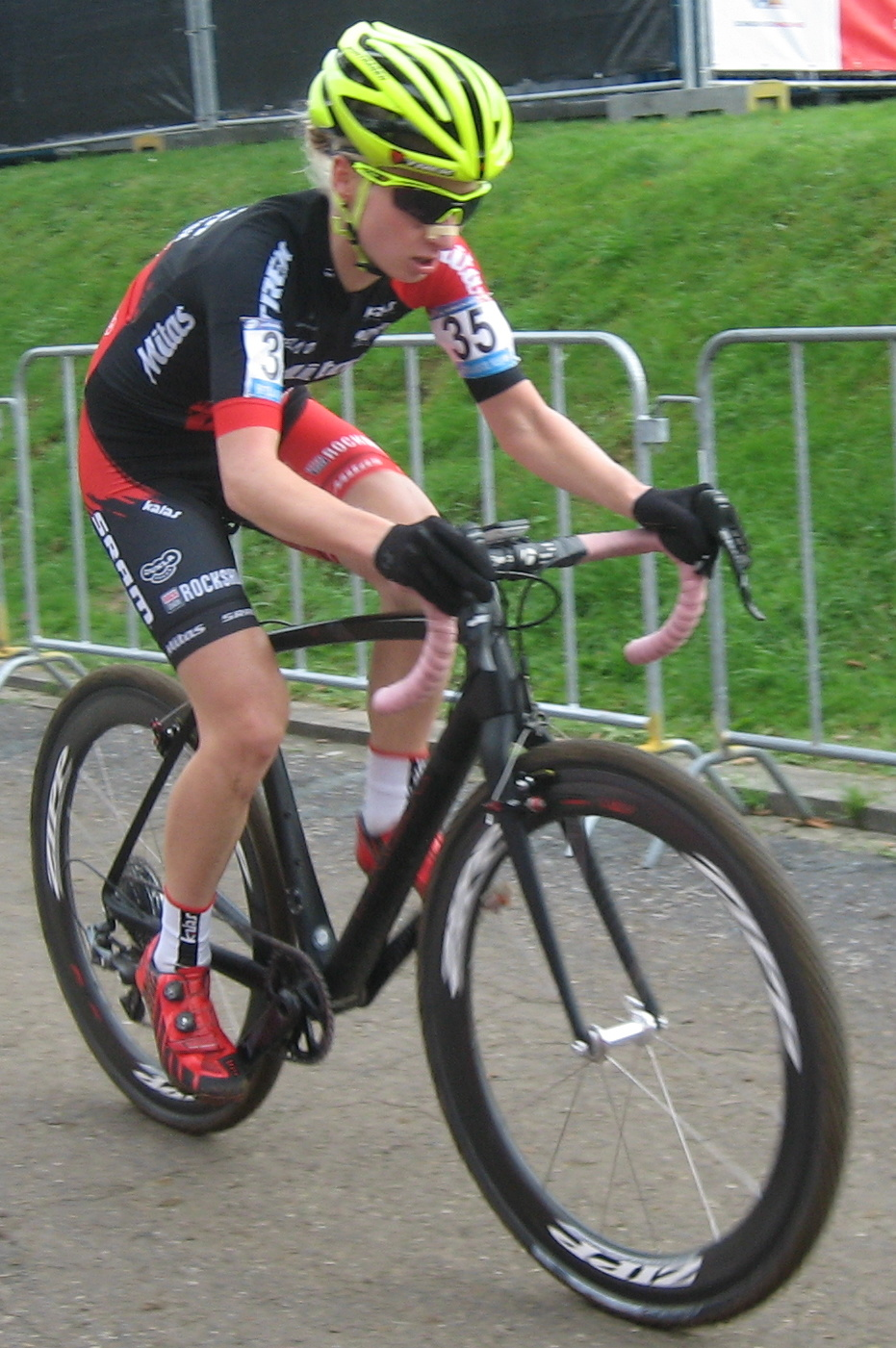 Jana Czeczinkarova (17e) in de wereldbeker veldrijden op de Cauberg in Valkenburg, Nederland, op zondag 23 oktober 2016.